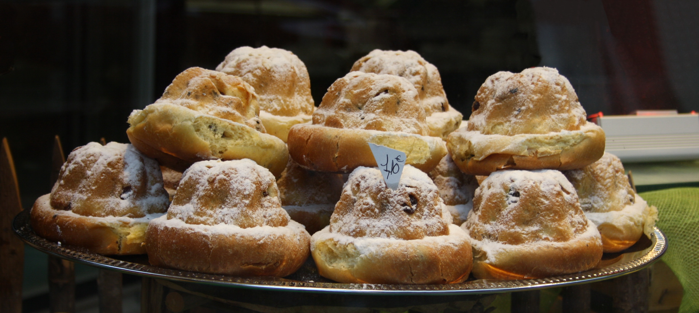 Kugelhupfverkauf in einem Geschäft in Frankreich.